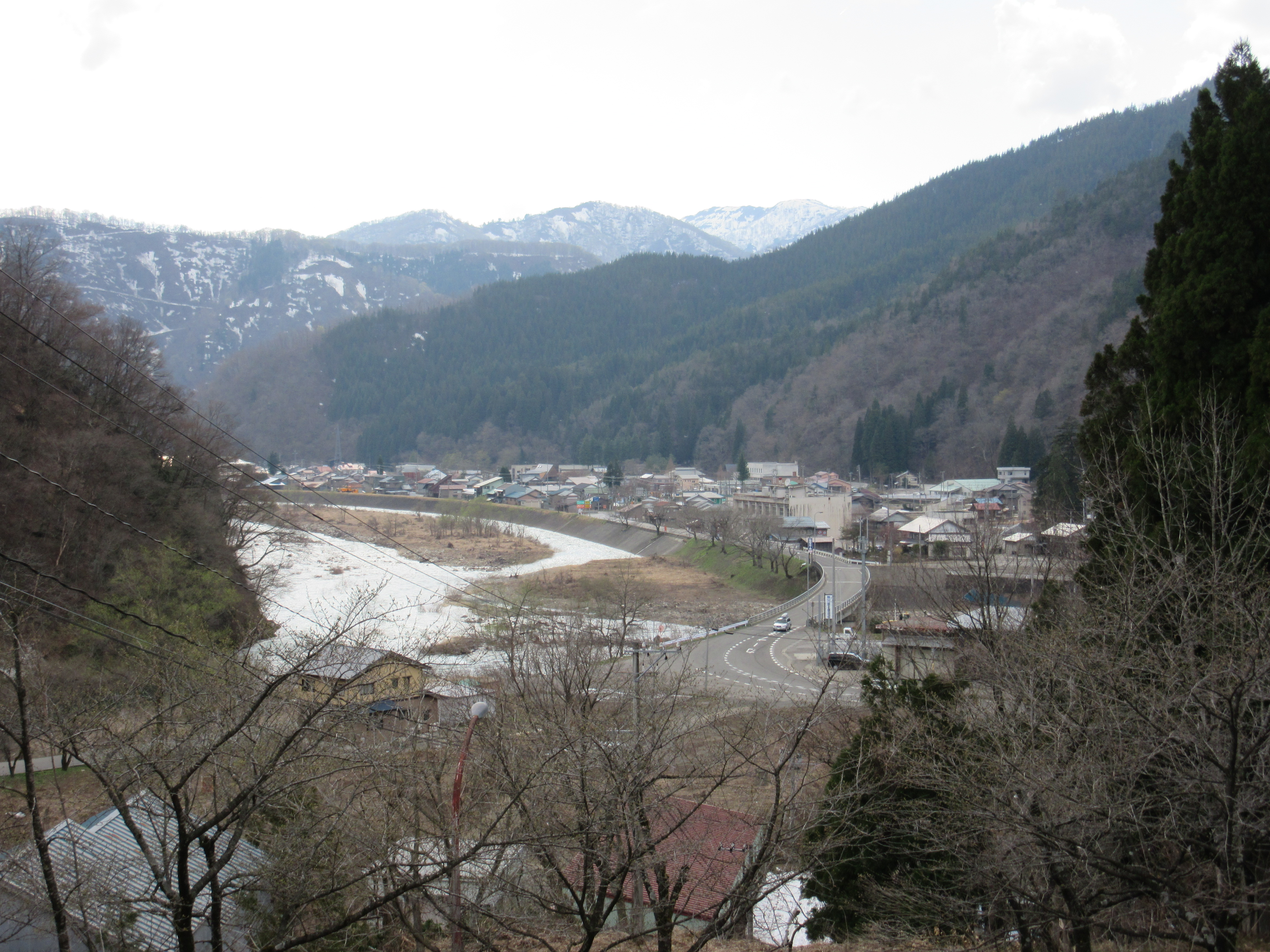 旧和泉村中心部（遠景）